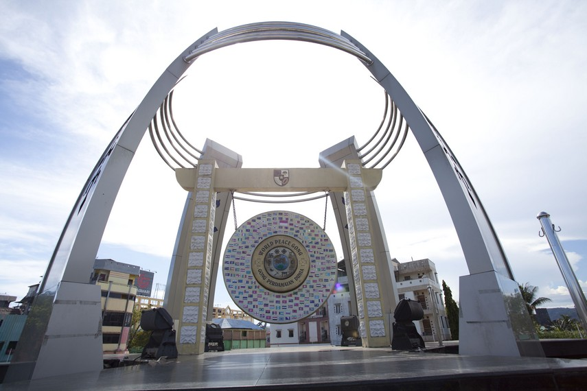 Gong Perdamaian Dunia ke-35 di Ambon